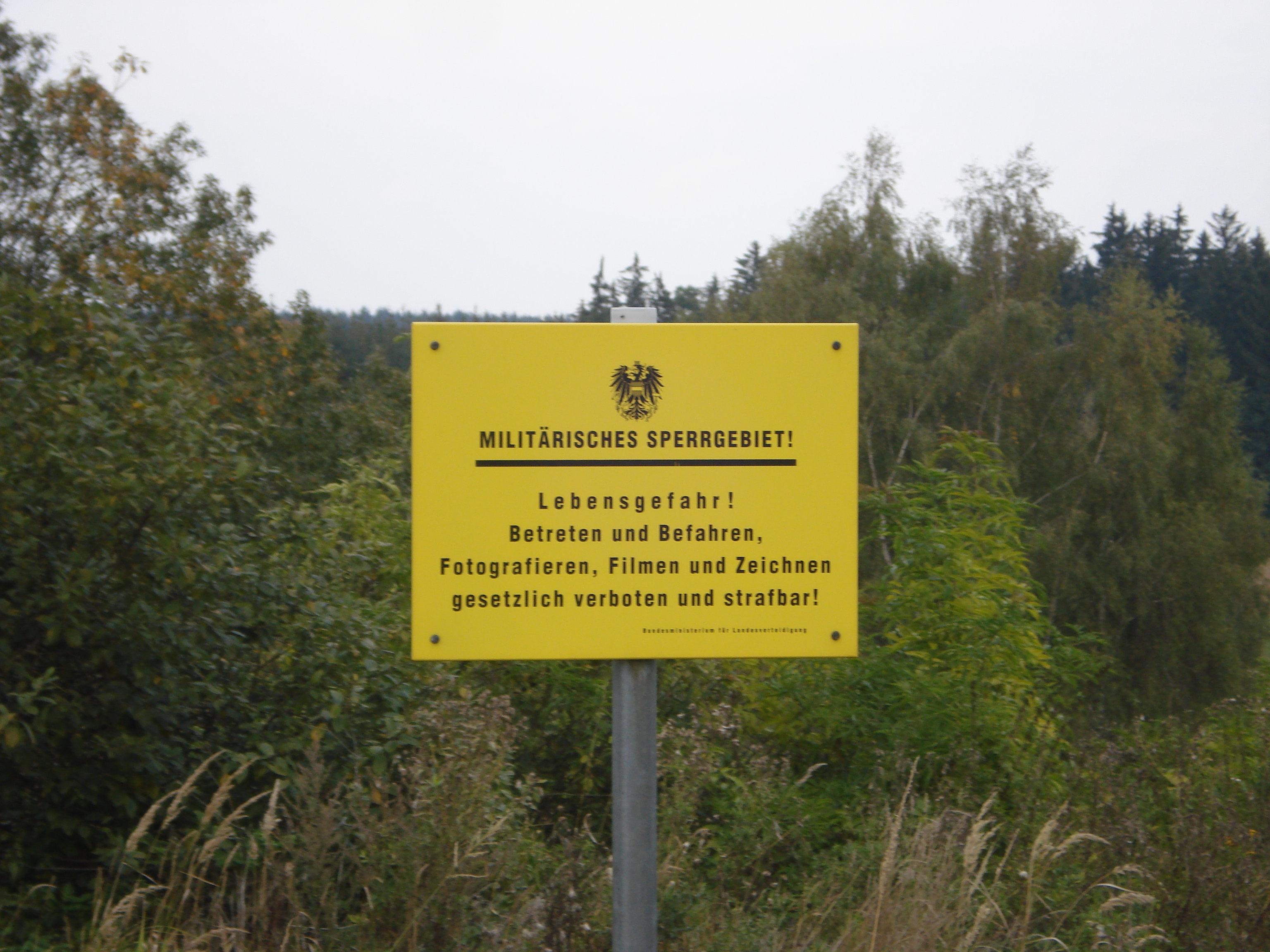 Schild am Rand des Truppenübungsplatzes Allentsteig, Österreich